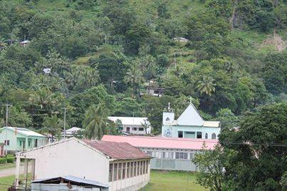 Tetun: eskola